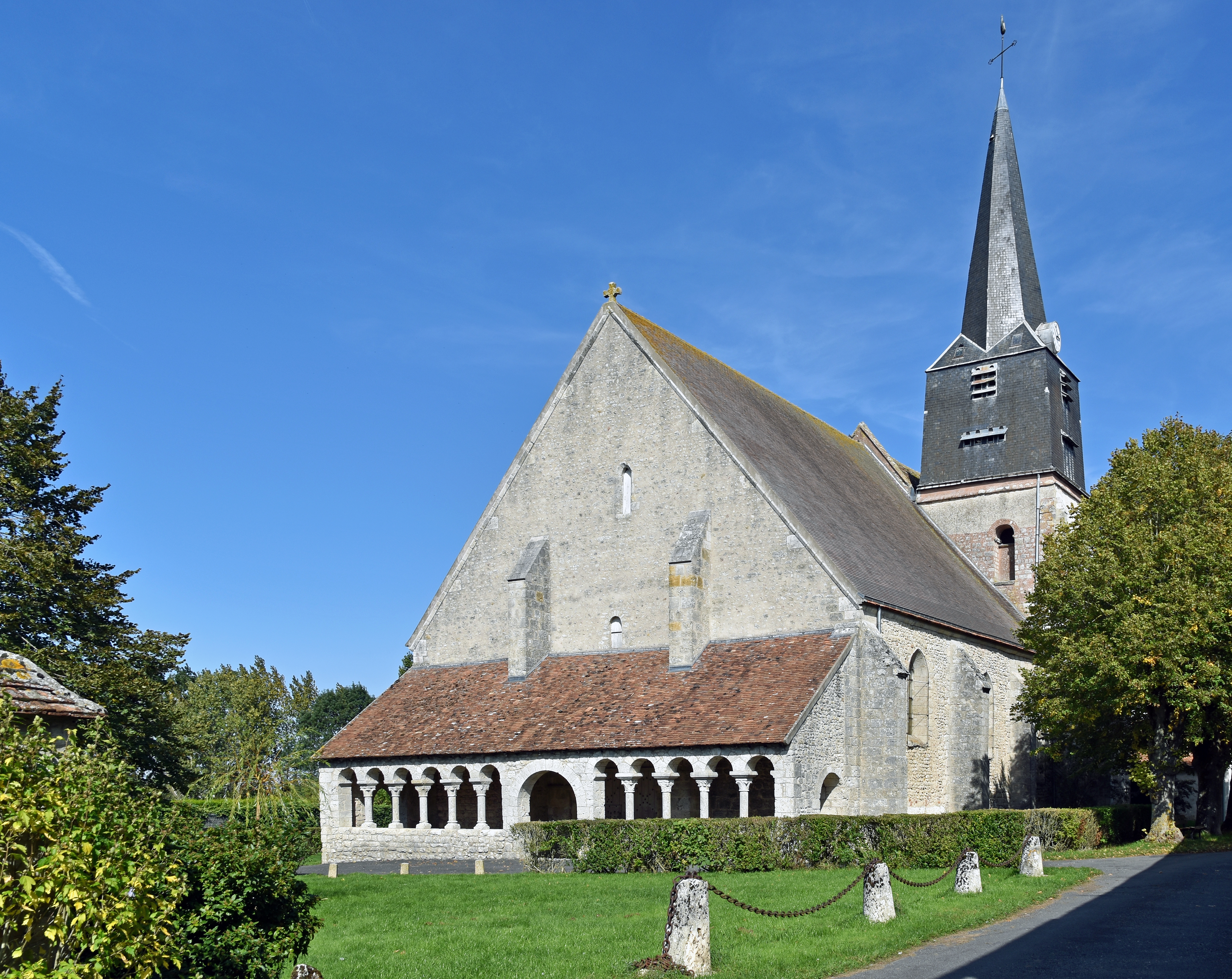 Église Saint-Germain de Boësses, Loiret, France .